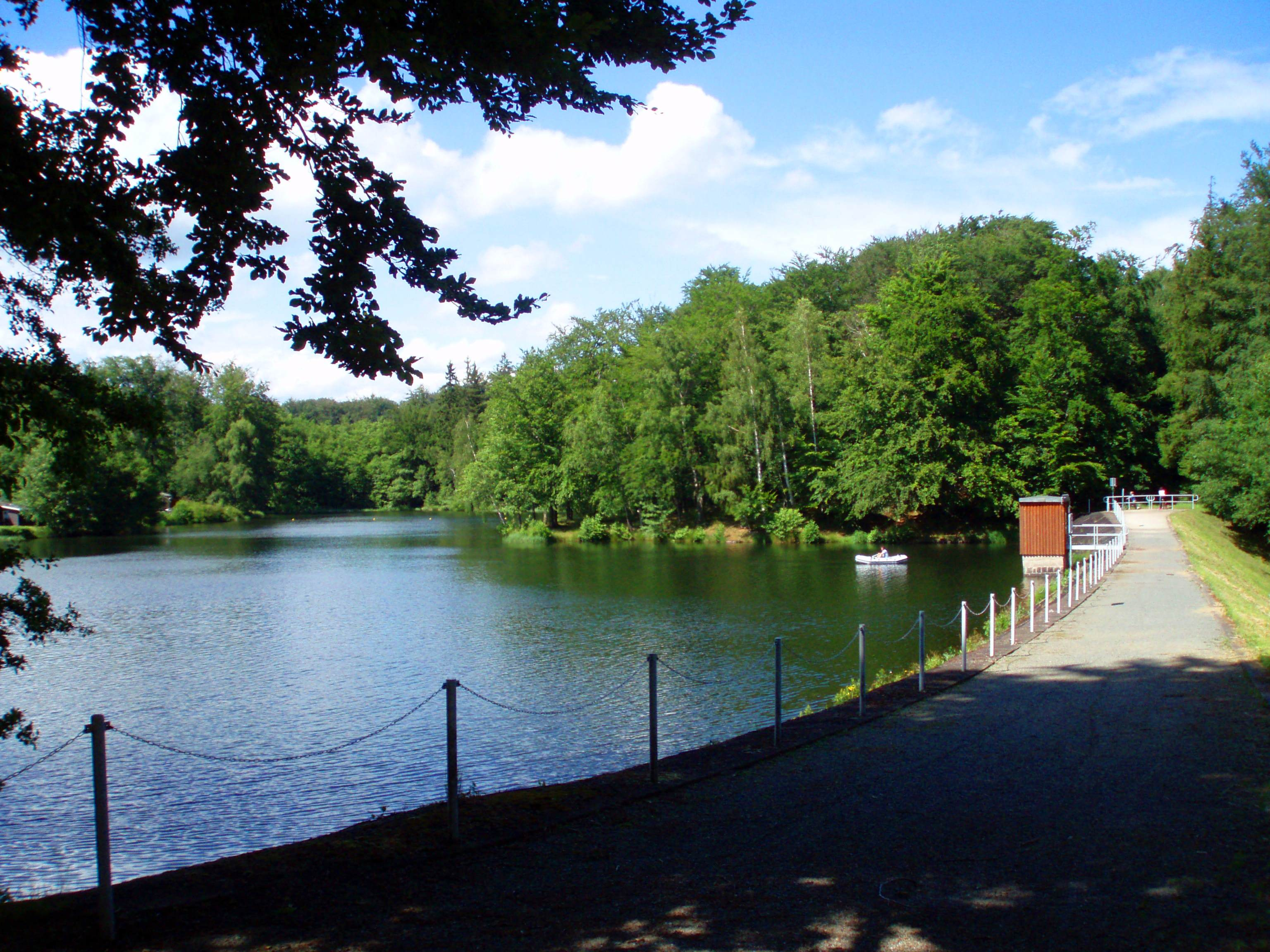 Bremer Teich